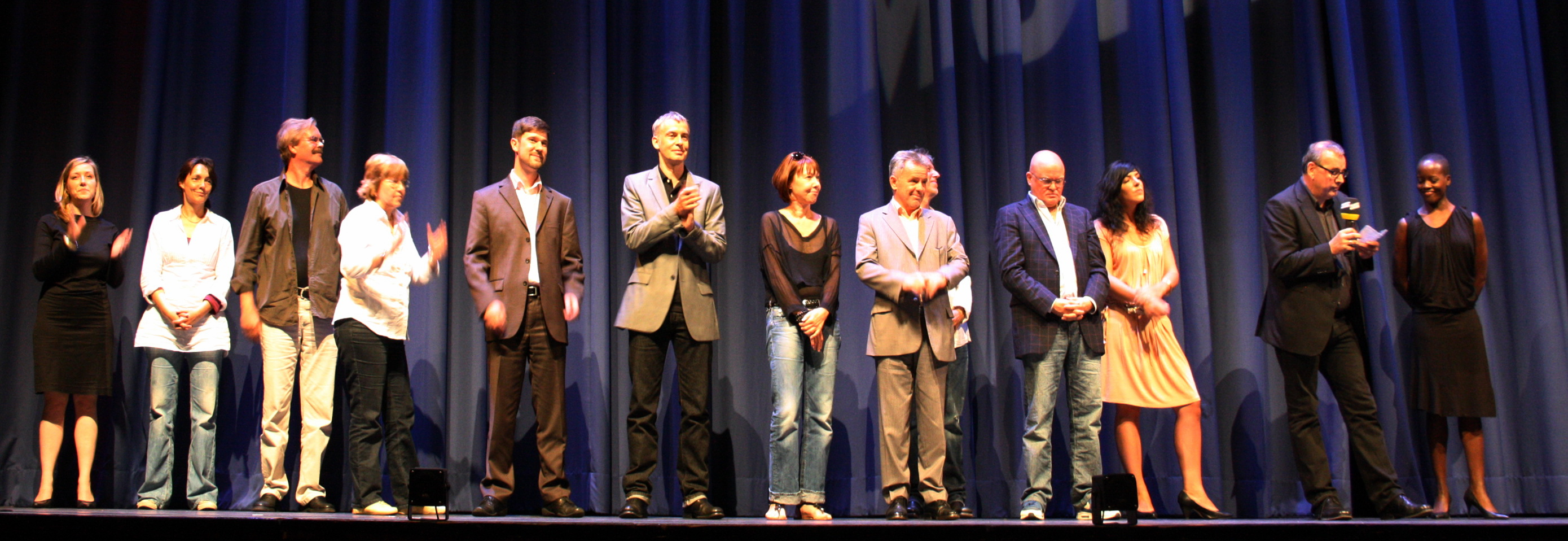 Premiere des Films Kongo auf dem Filmfest München 2010. Personen die an der Produktion beteiligt waren und rechts die Schauspielerin Florence Kasumba.